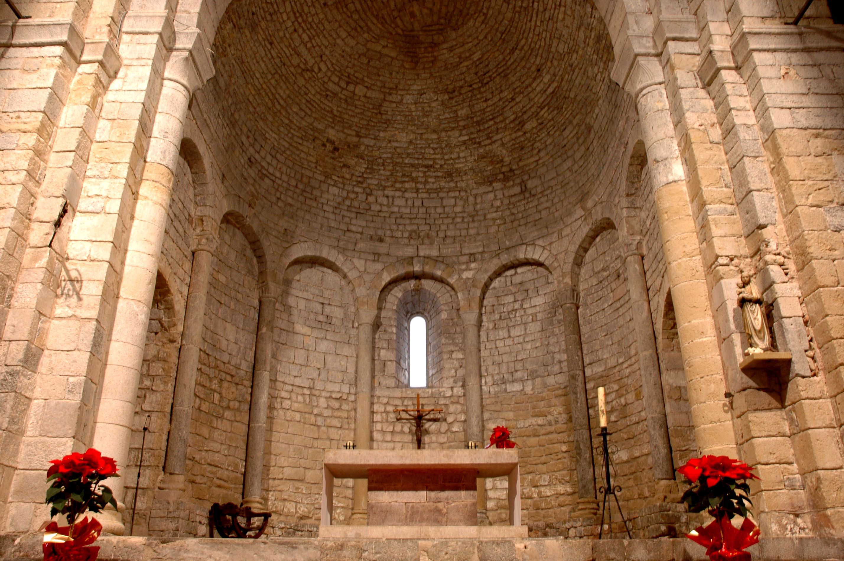 Santa Maria de Vilabertran - Absis interior